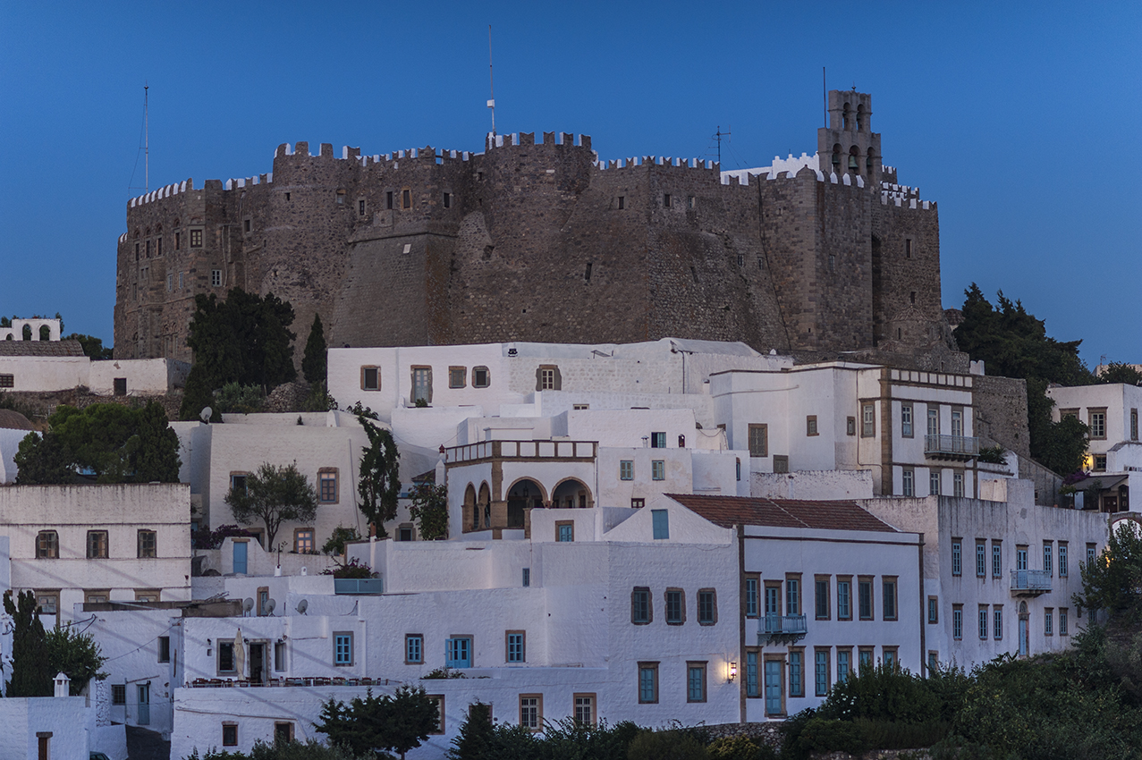 Το μοναστήρι-κάστρο του Αγίου Ιωάννη του Θεολόγου στην Πάτμο.